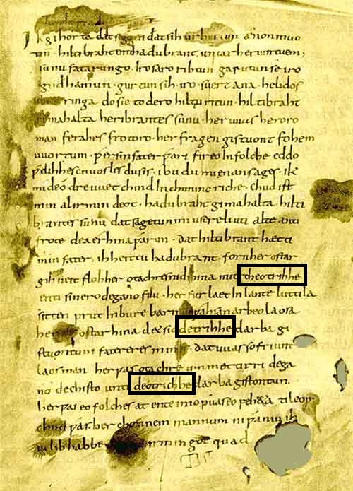 Occurrences de "Dietrich" dans le Chant de Hildebrand